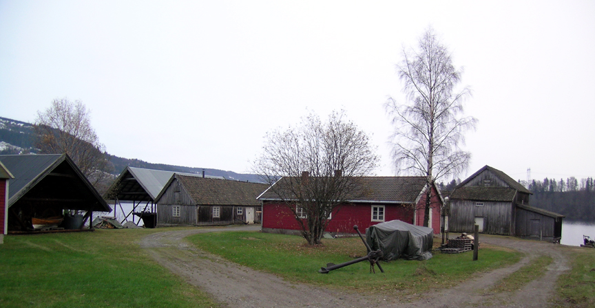 Mjøssamlingene at Minnesund, Eidsvoll, Norway.